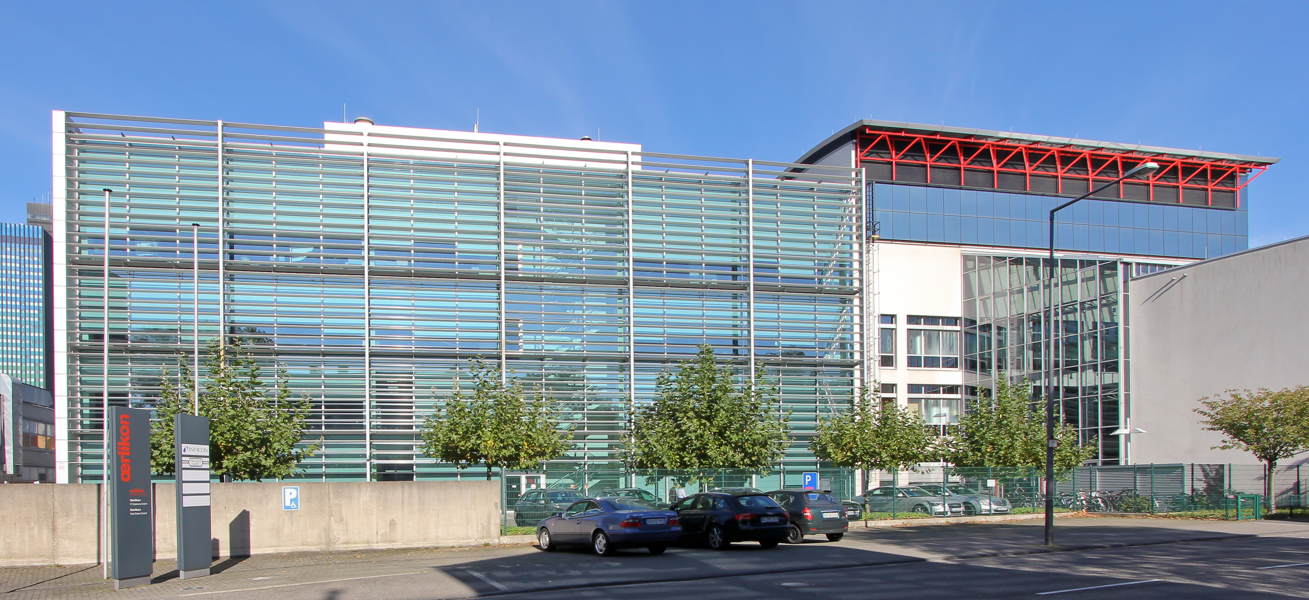 Zentrale der Oerlikon Leybold Vacuum GmbH, Ansicht von der Gaedestraße, Köln